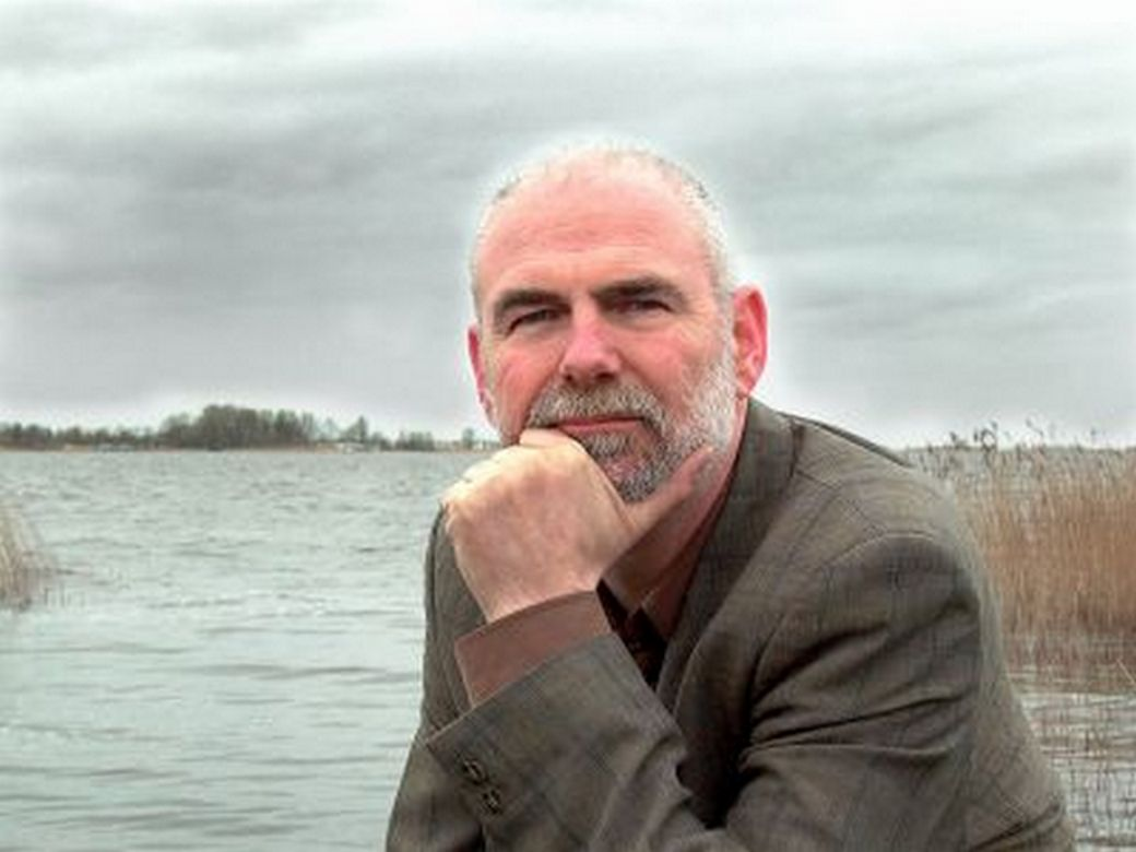 Eppie Dam troch Jan Kalma